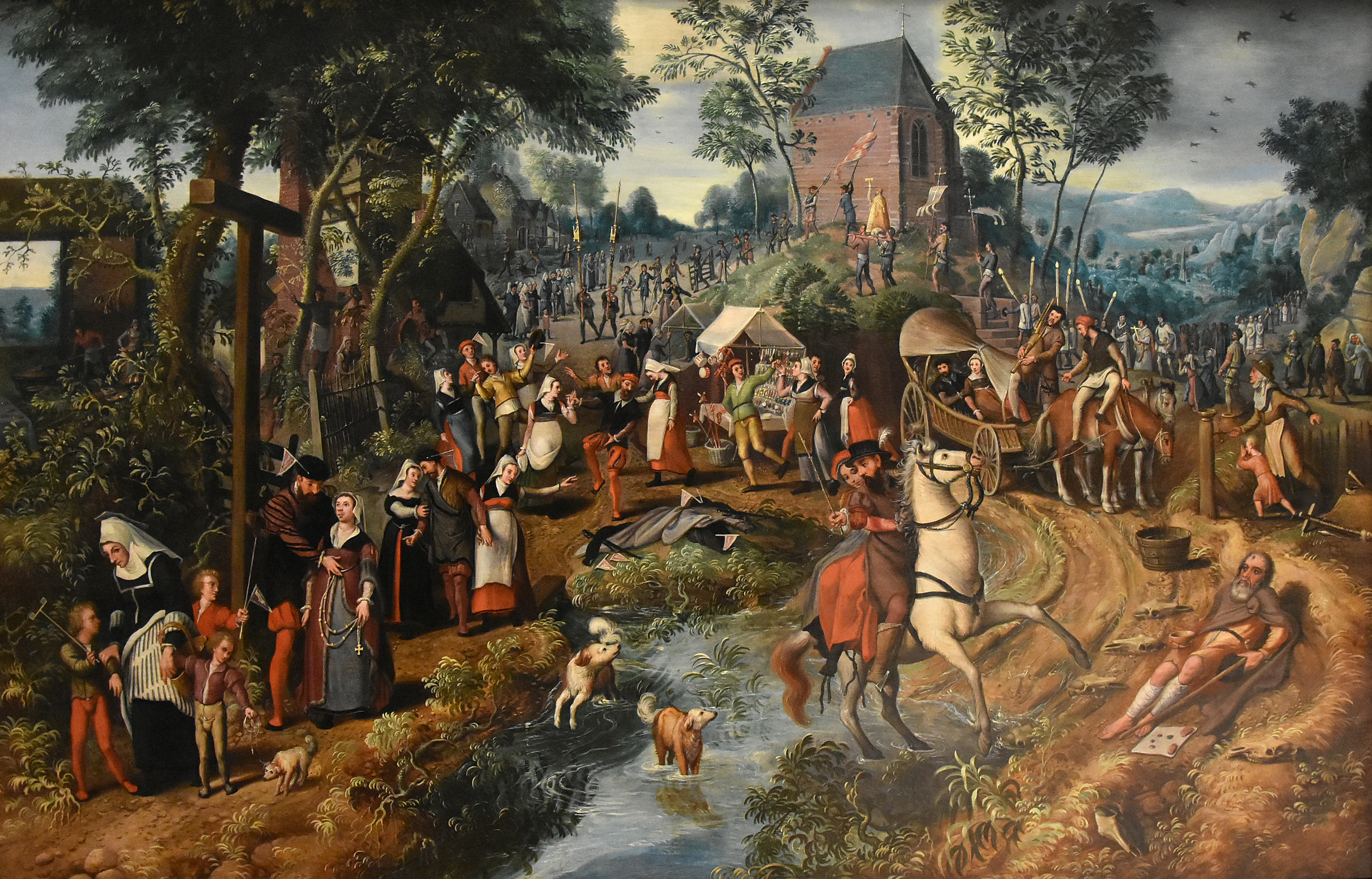 Pieter Aertsen (1508of1509-1575) De terugkeer van een Sint-Antoniusbedevaart in het Oldmastersmuseum te Brussel